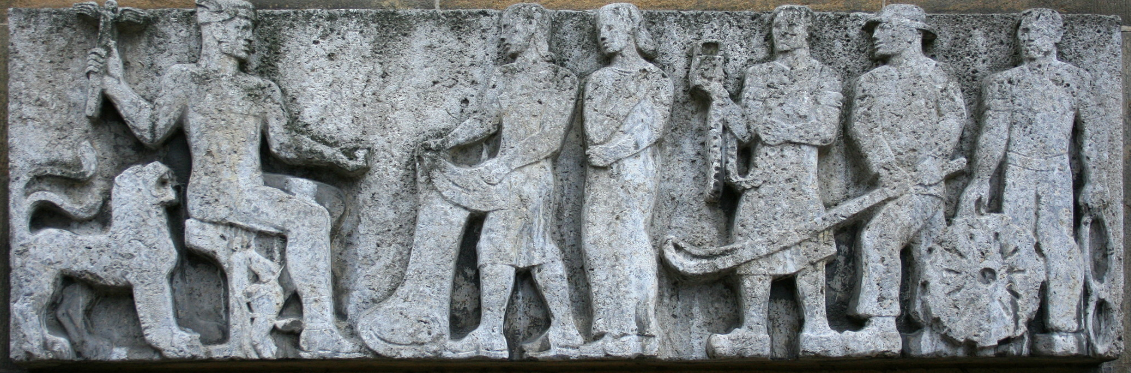 Steinrelief Merkur und sein Gefolge, Industrie- und Handelskammer Wuppertal-Solingen-Remscheid